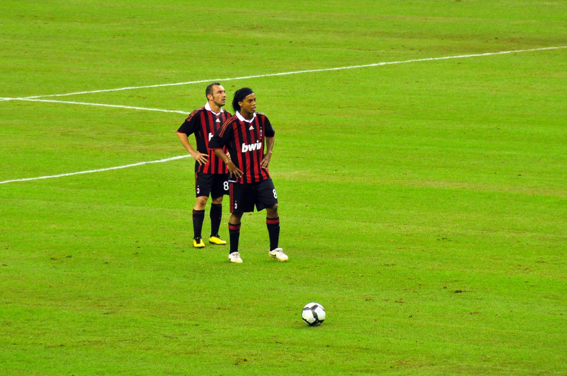 AC Milan - Impact de Montréal